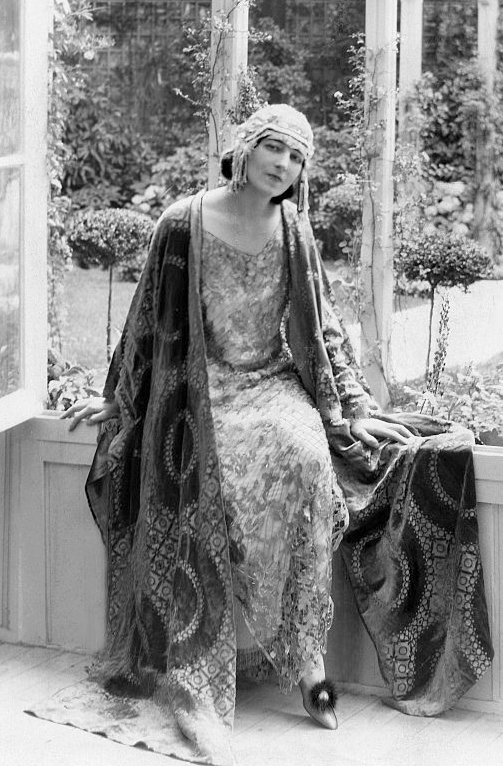 Ida Rubinstein